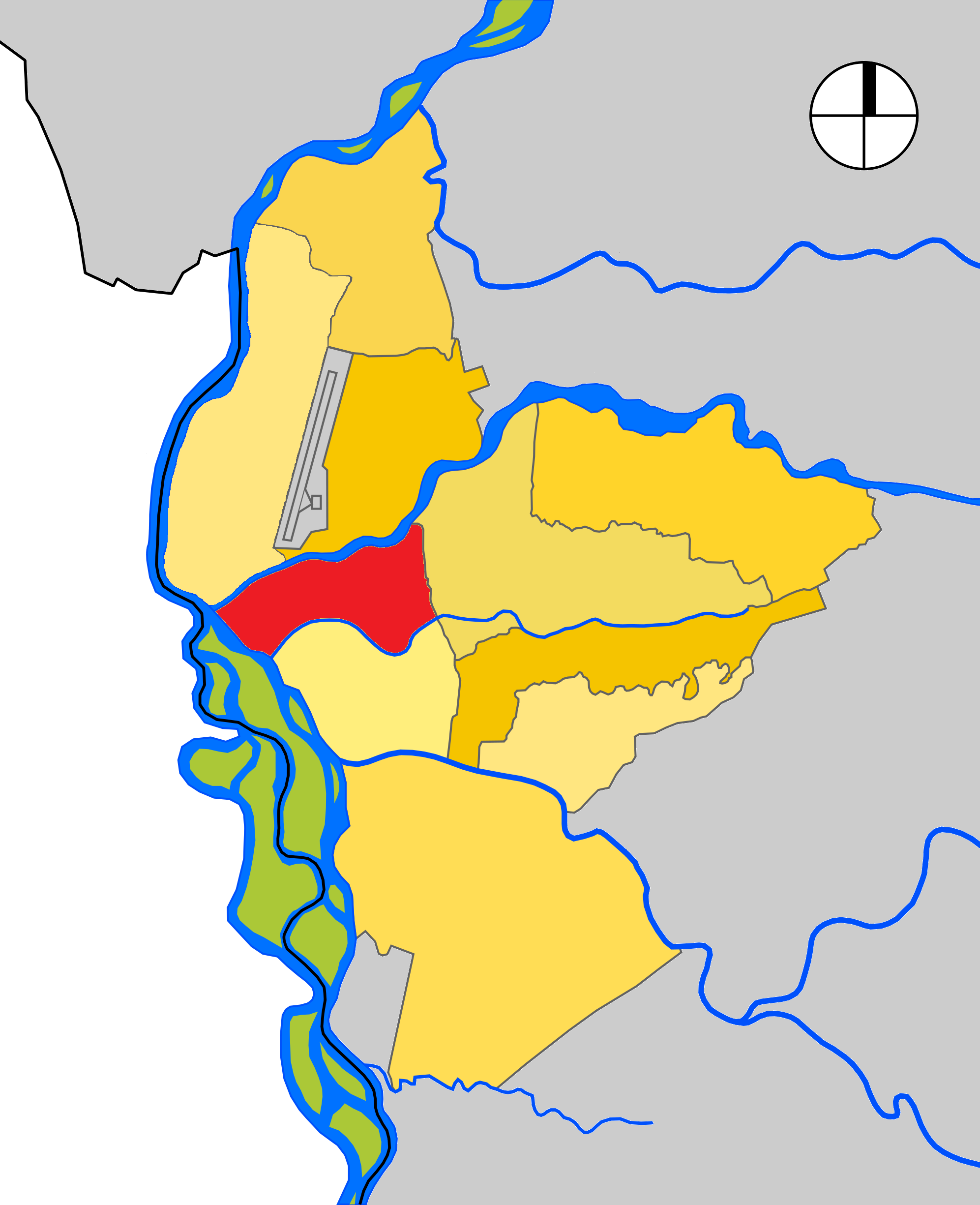 Mapa de las Comuna 3 de Neiva, departamento del Huila, Colombia.